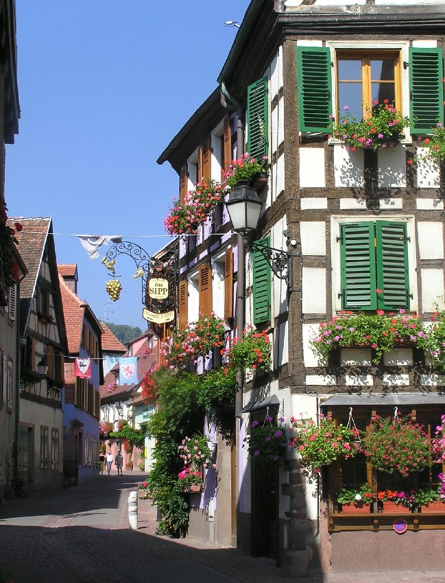 Fachwerkromantik in Ribeauvillé Fotograf: Oswald Engelhardt